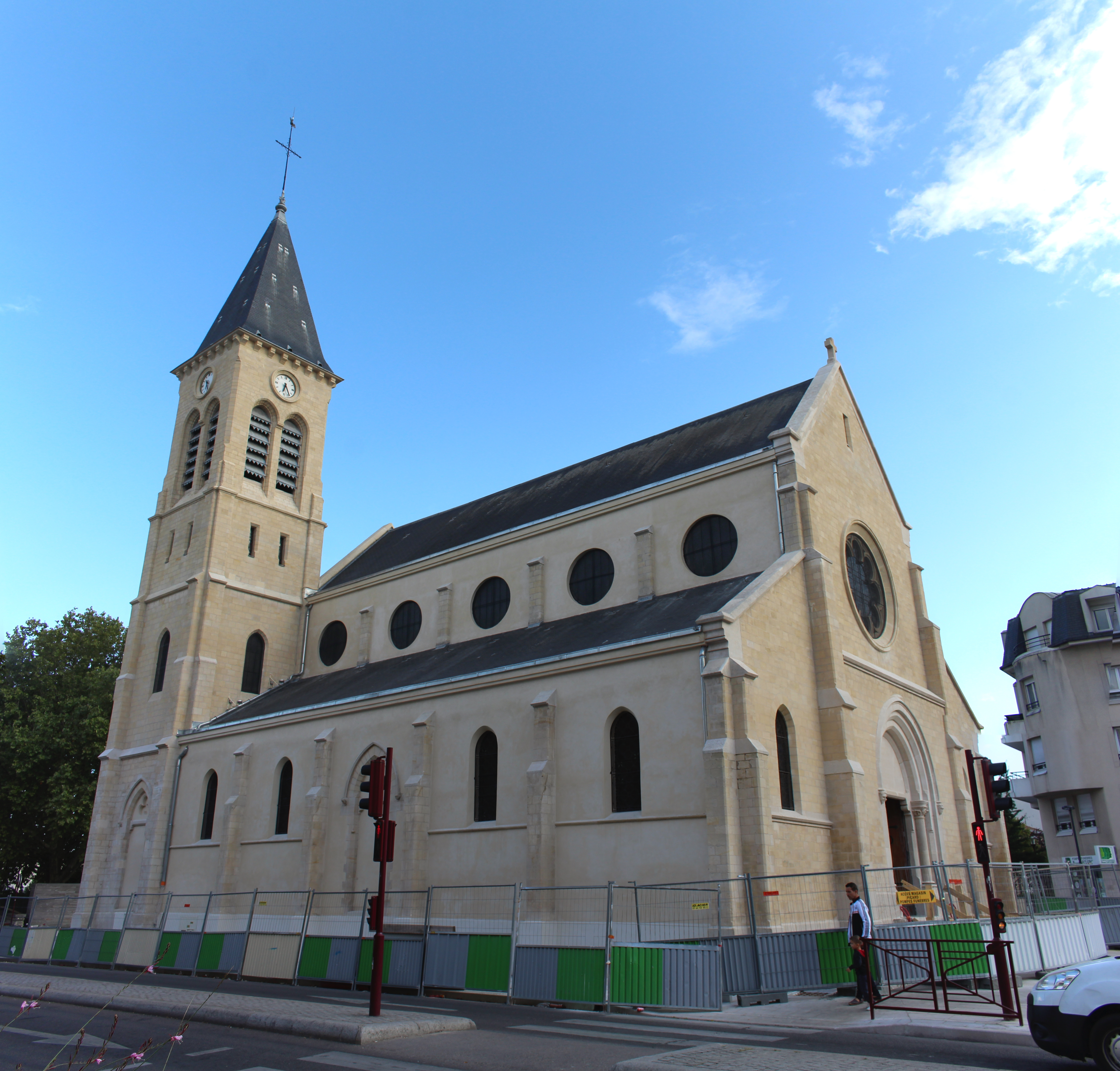 Église Saint-Pierre de Bondy.